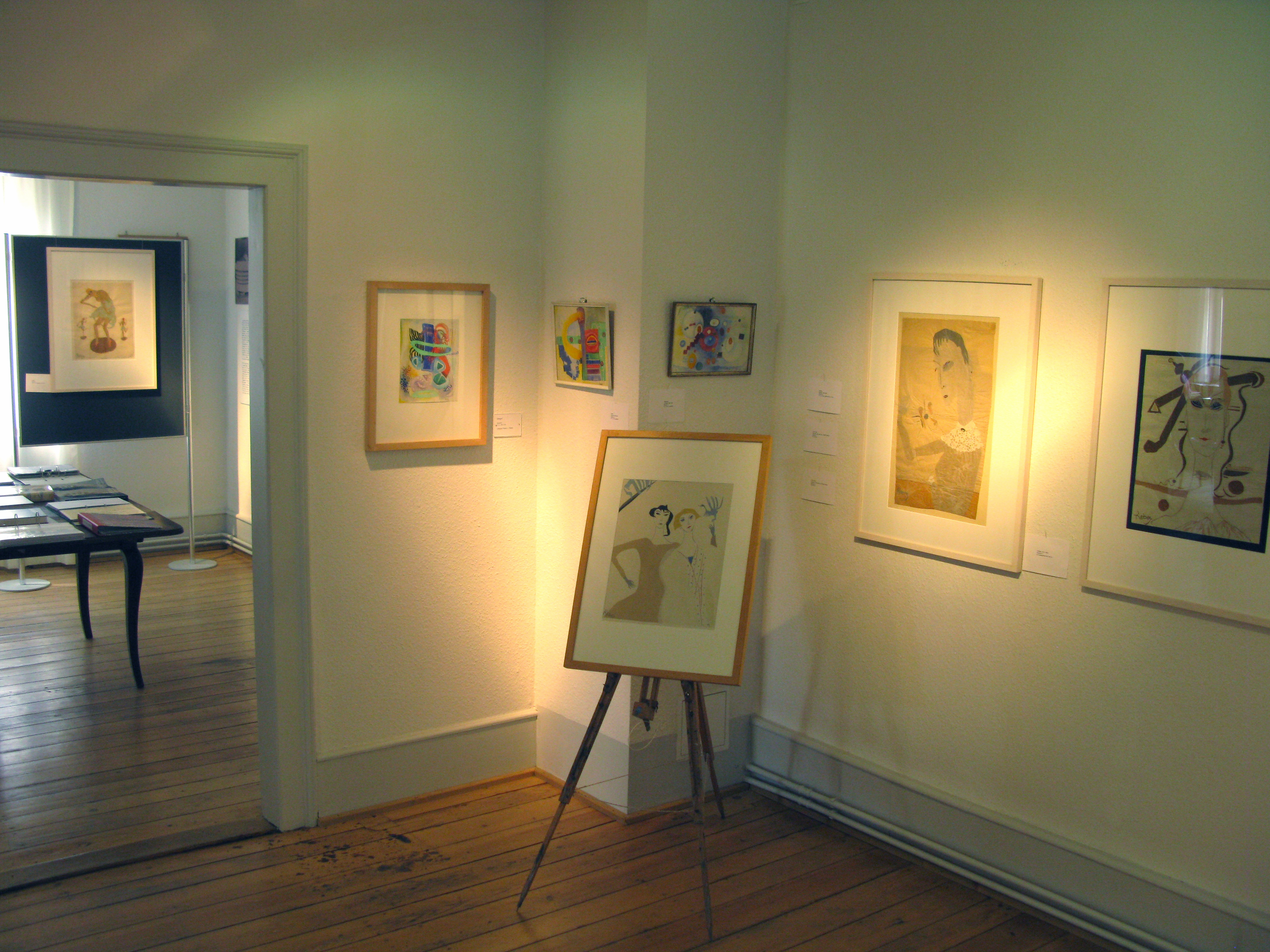 Rebay Haus Teningen, Museum